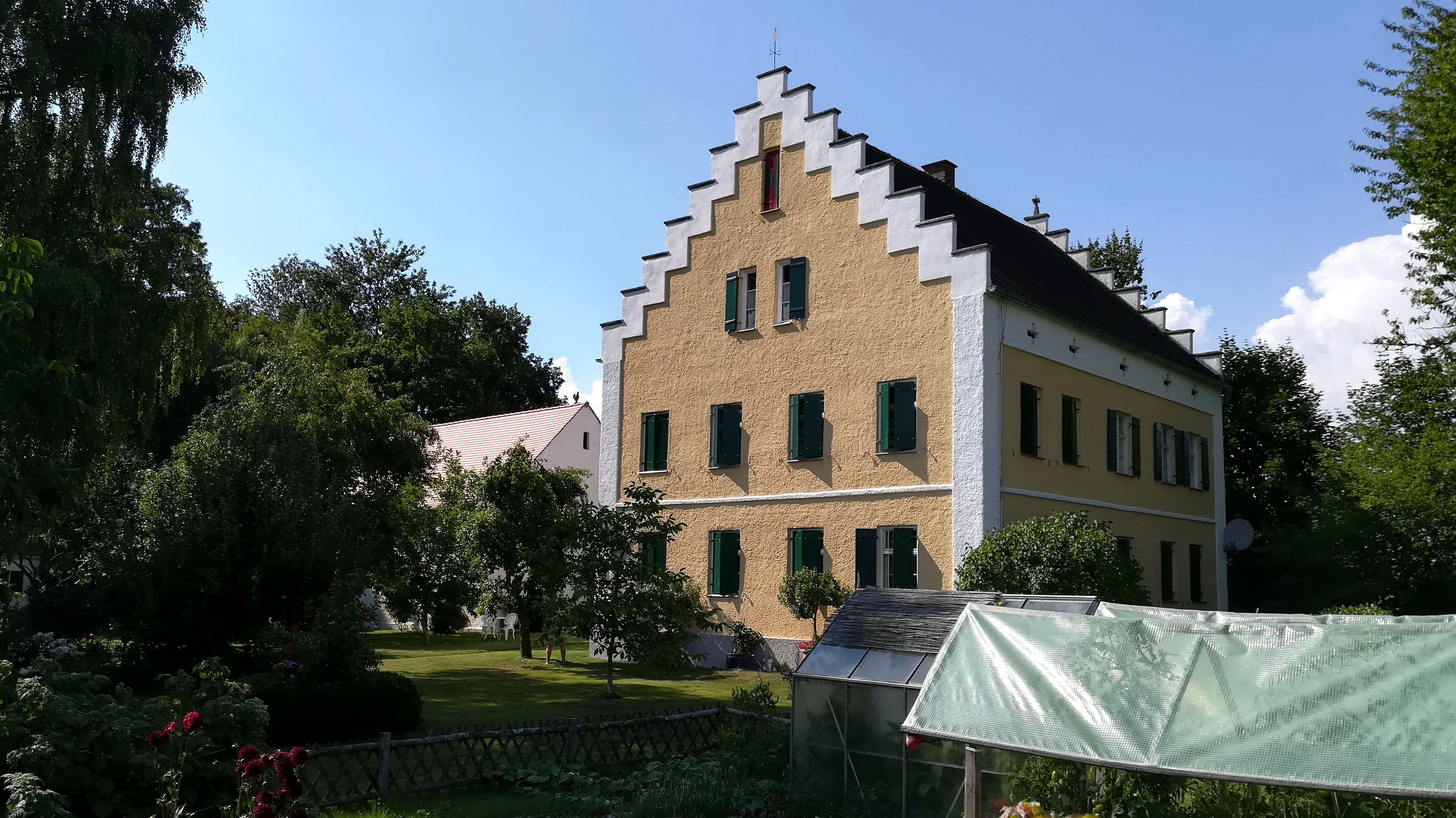 Ehemals Pfarrhausː Zweigeschossiger, giebelständiger Satteldachbau mit Treppengiebeln, Ecklisenen und kreuzförmigen Bändern an der Traufe, 1862/63; Stadel, traufseitiger Massivbau mit Satteldach und segmentbogigen Toren, 19. Jahrhundert; Nebengebäude, erdgeschossiger Satteldachbau, 19. Jahrhundert